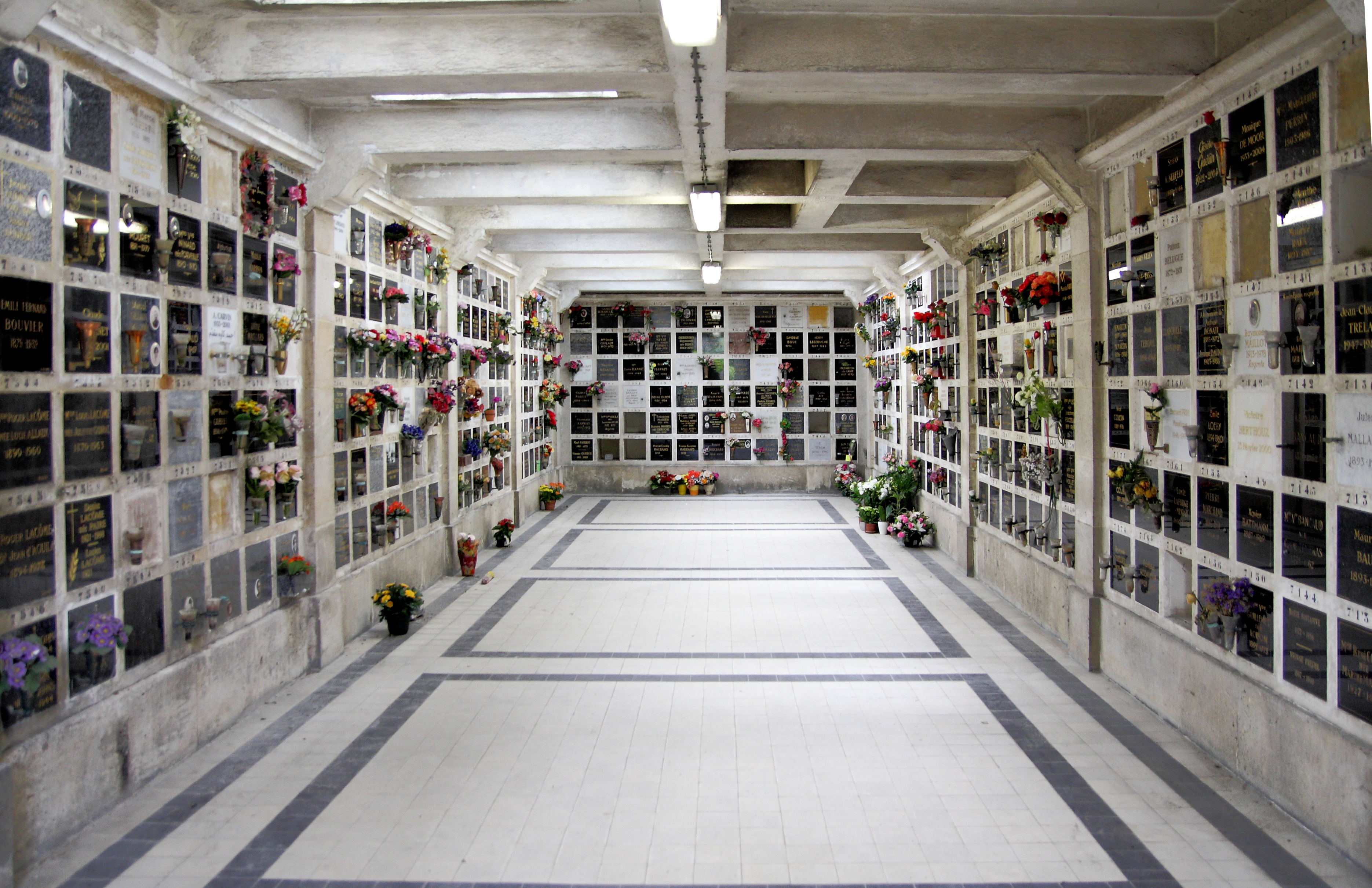 Salle du columbarium du Père-Lachaise, Paris